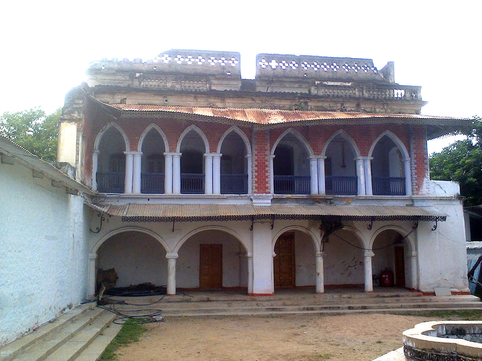 ఆత్మకూర్‌ సంస్థానాధీశుల నివాసం